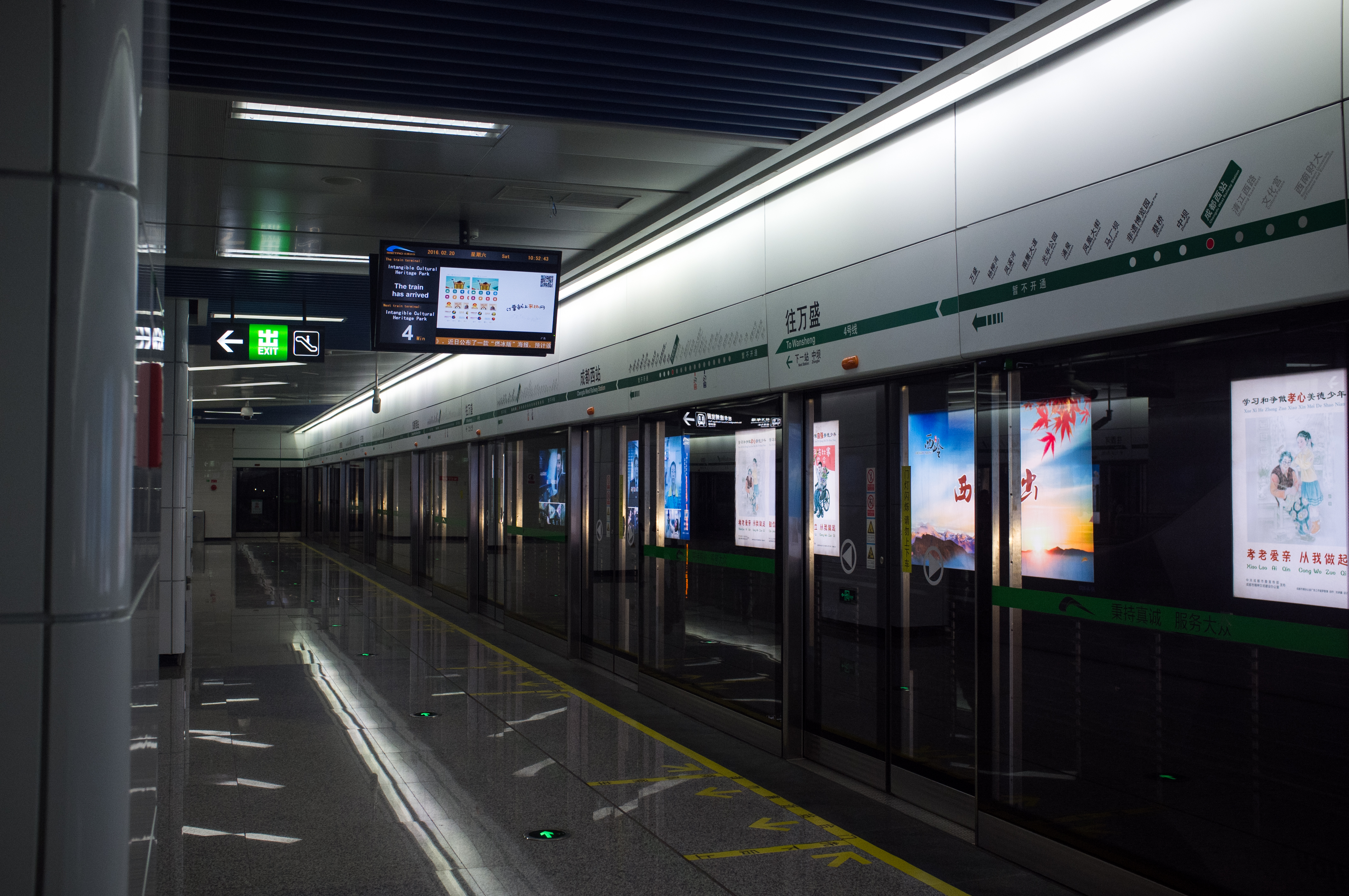 中文（中国大陆）: 地铁成都西站站台